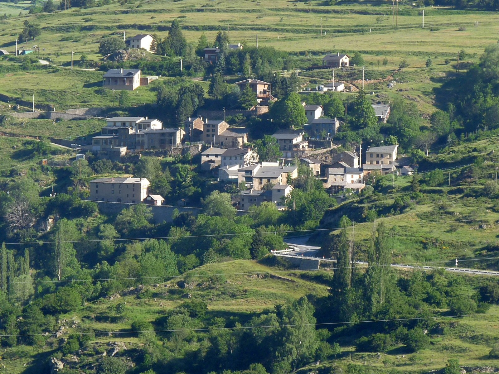 Vue sur Fetges, Sauto, depuis Planès, Pyrénées-Orientales, France